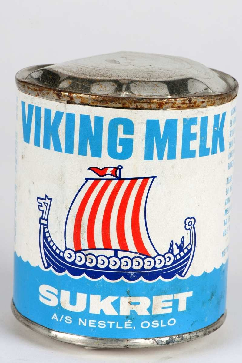 Hermetikkboks med Viking Melk, fra ca. 1950. Gjenstanden stammer fra opprydding på Framnæs, etter hvalbåten Southern Actors aktivitet. Viking Melk ble ofte brukt som proviant ombord i fartøy.